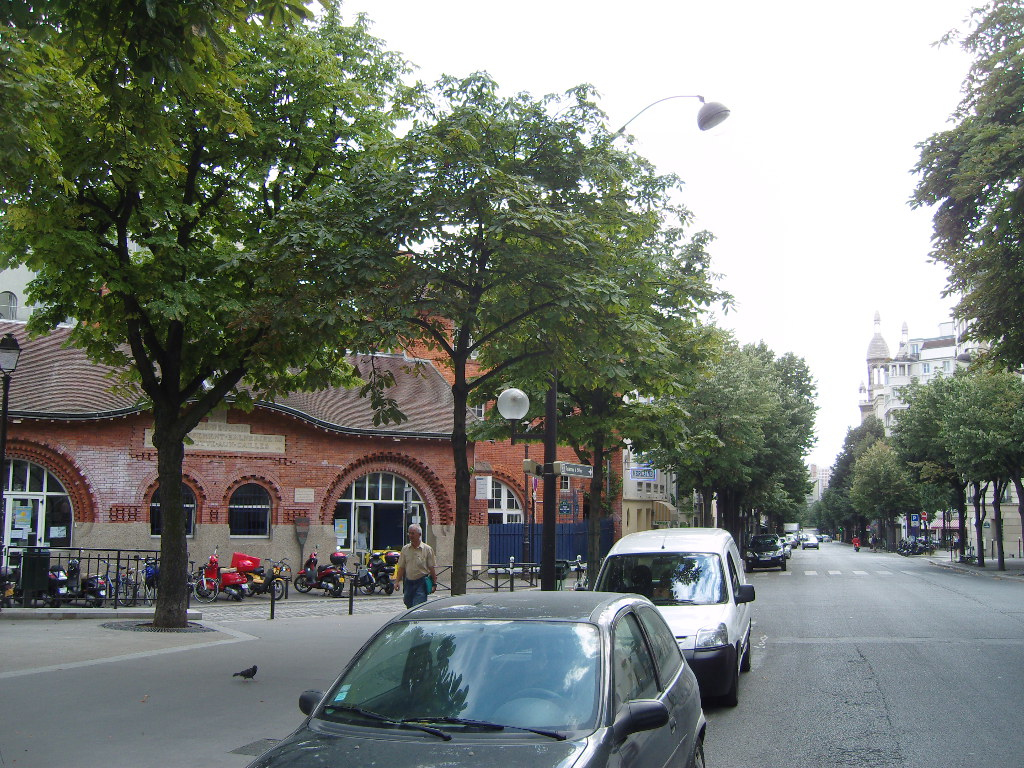 Paris, 13e arrondissement, rue Bobillot, place Paul-Verlaine.